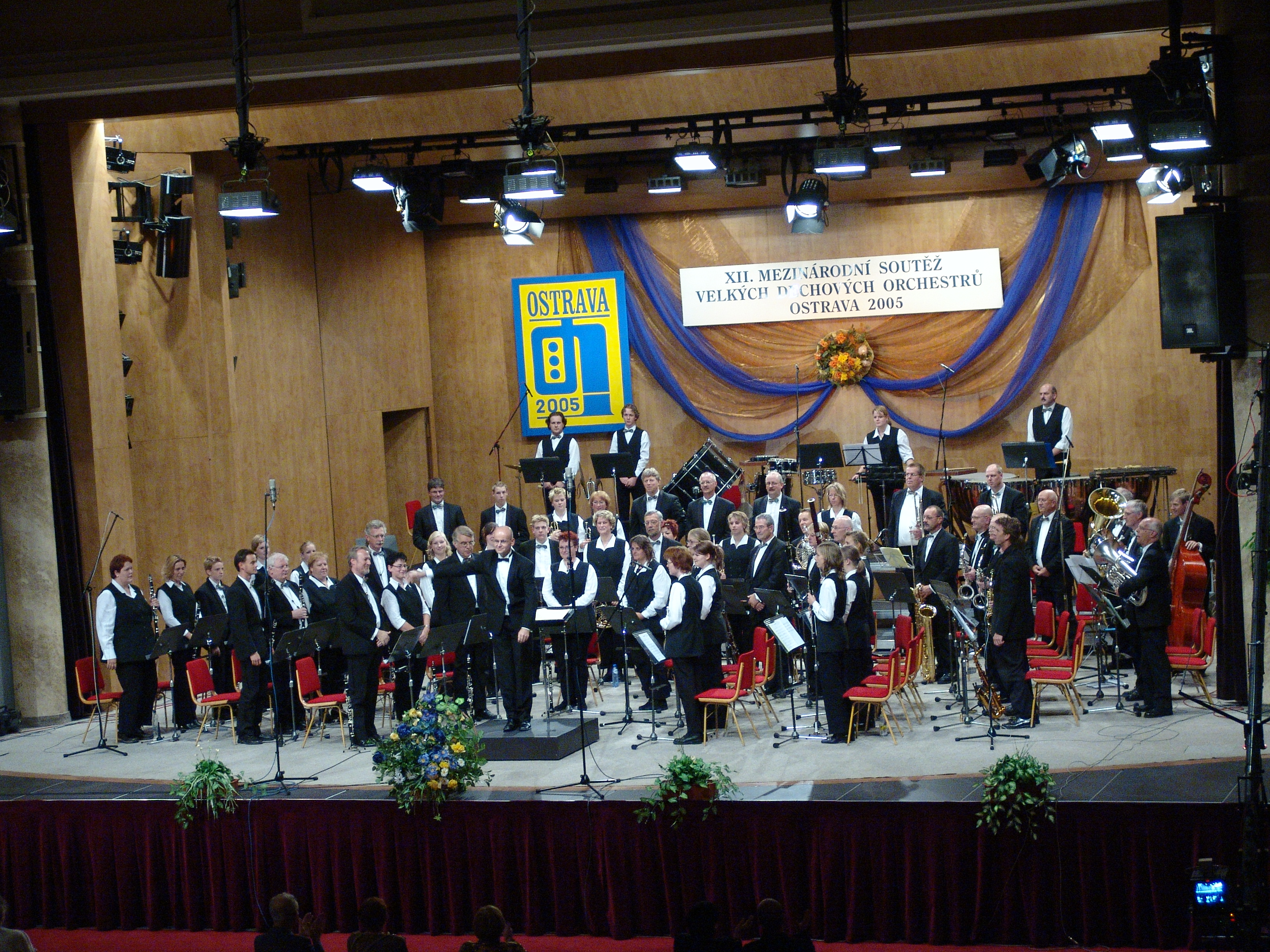 KSW tijdens optreden op internationaal festival voor blaasorkesten